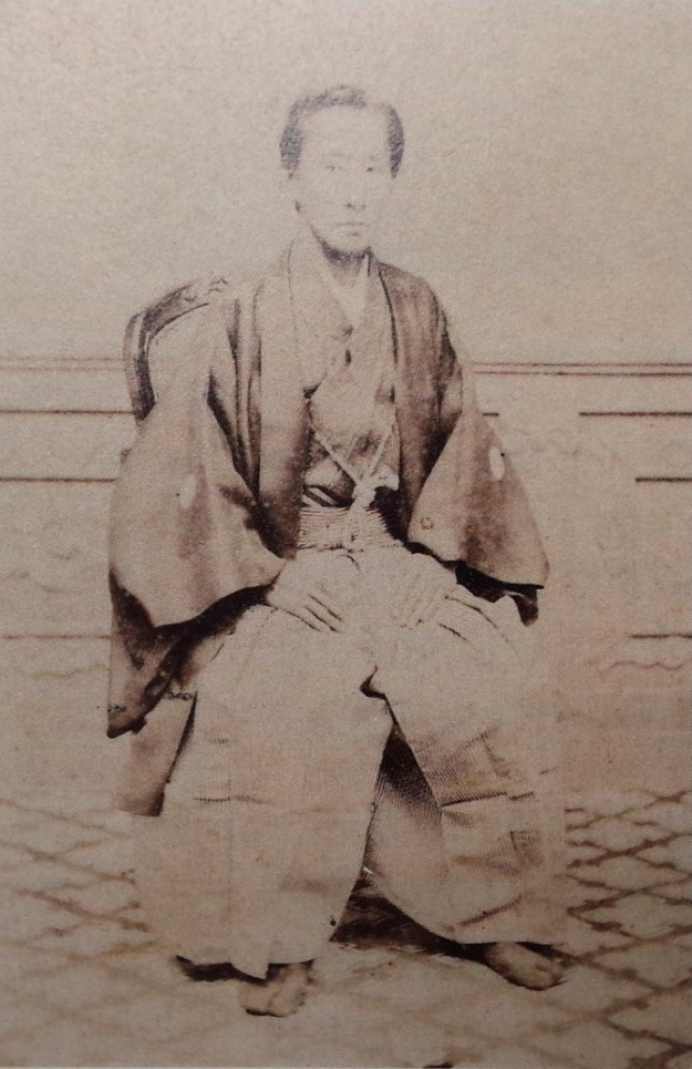 南部信民の肖像写真。